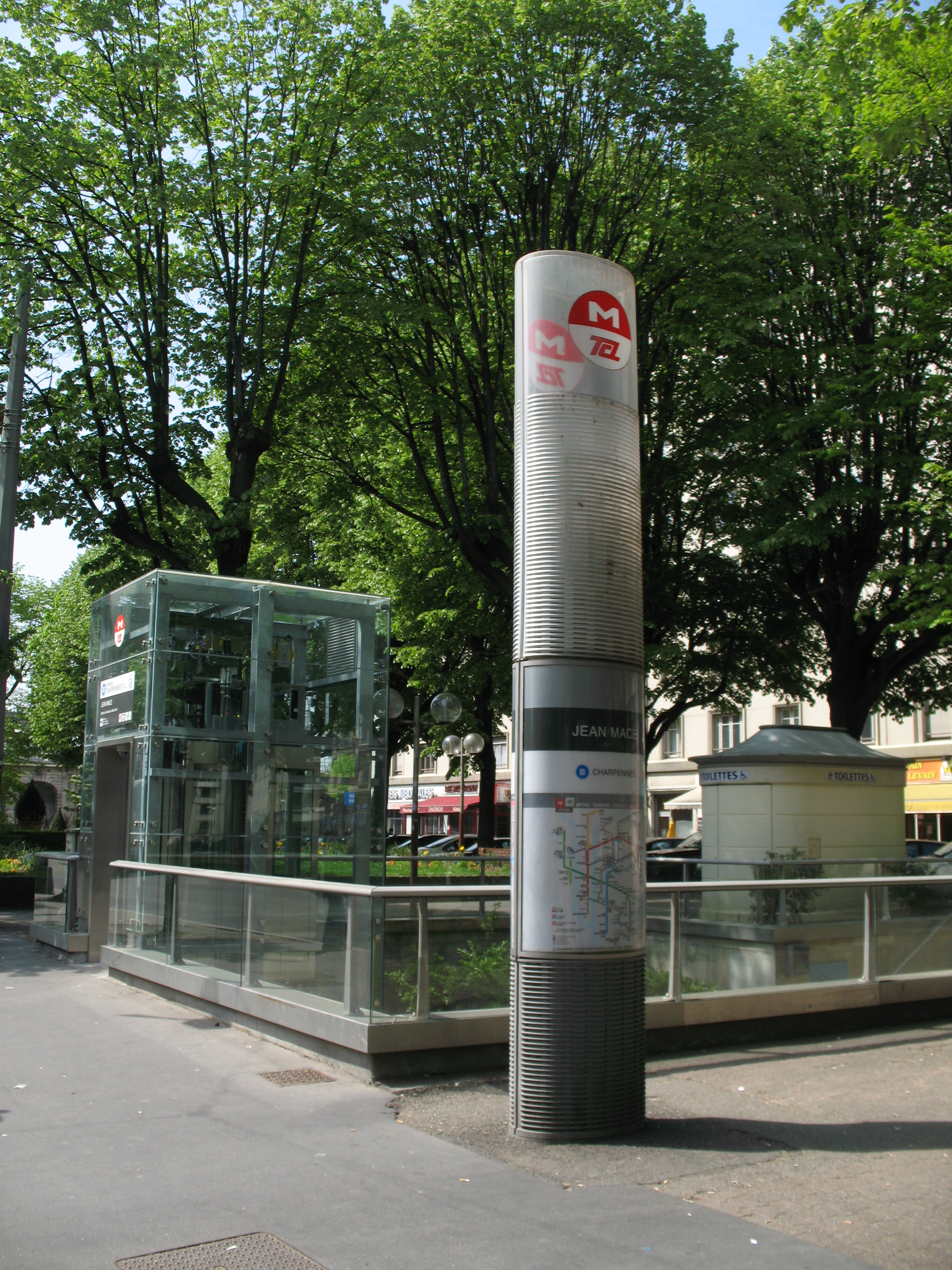 Métro ligne B à Lyon sur le réseau TCL (station Jean Macé).